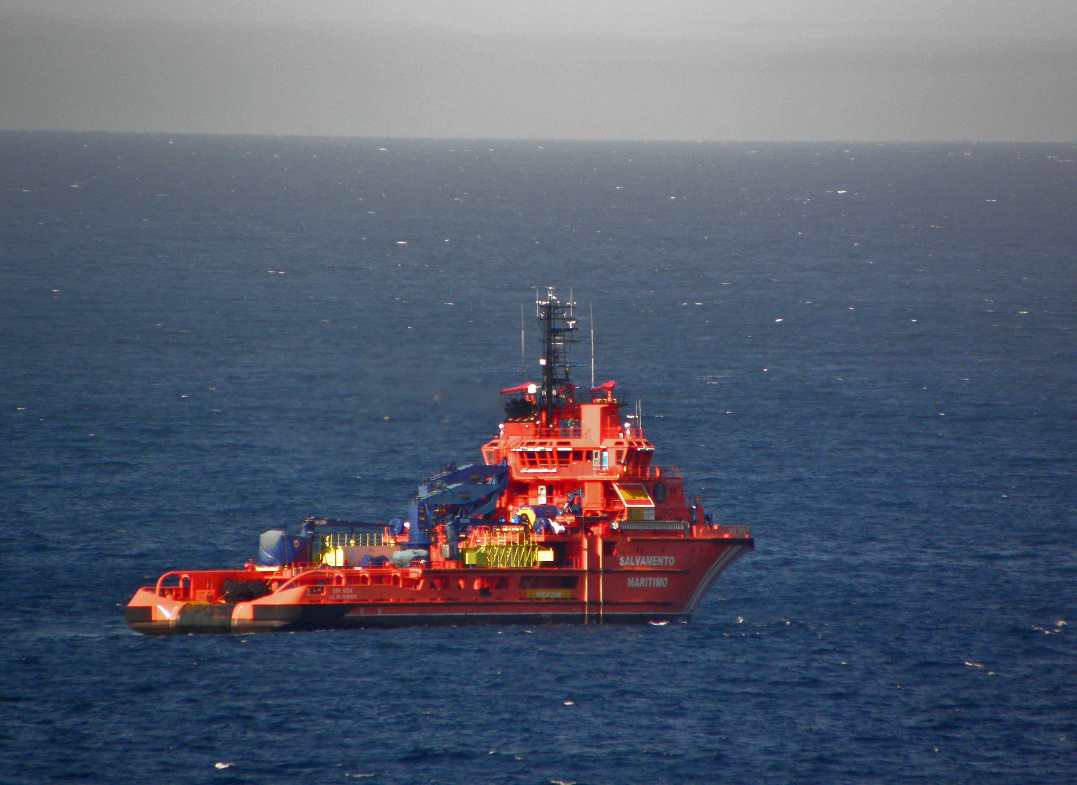 Remolcador AHTS - Don Inda MMSI: 224769000 IMO: 9338010